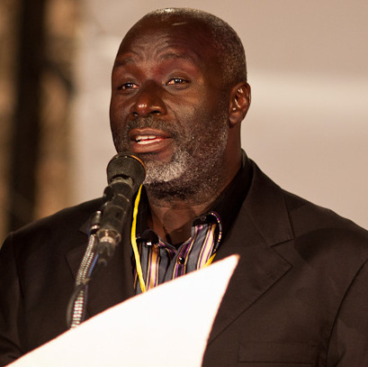 Ali Mufuruki